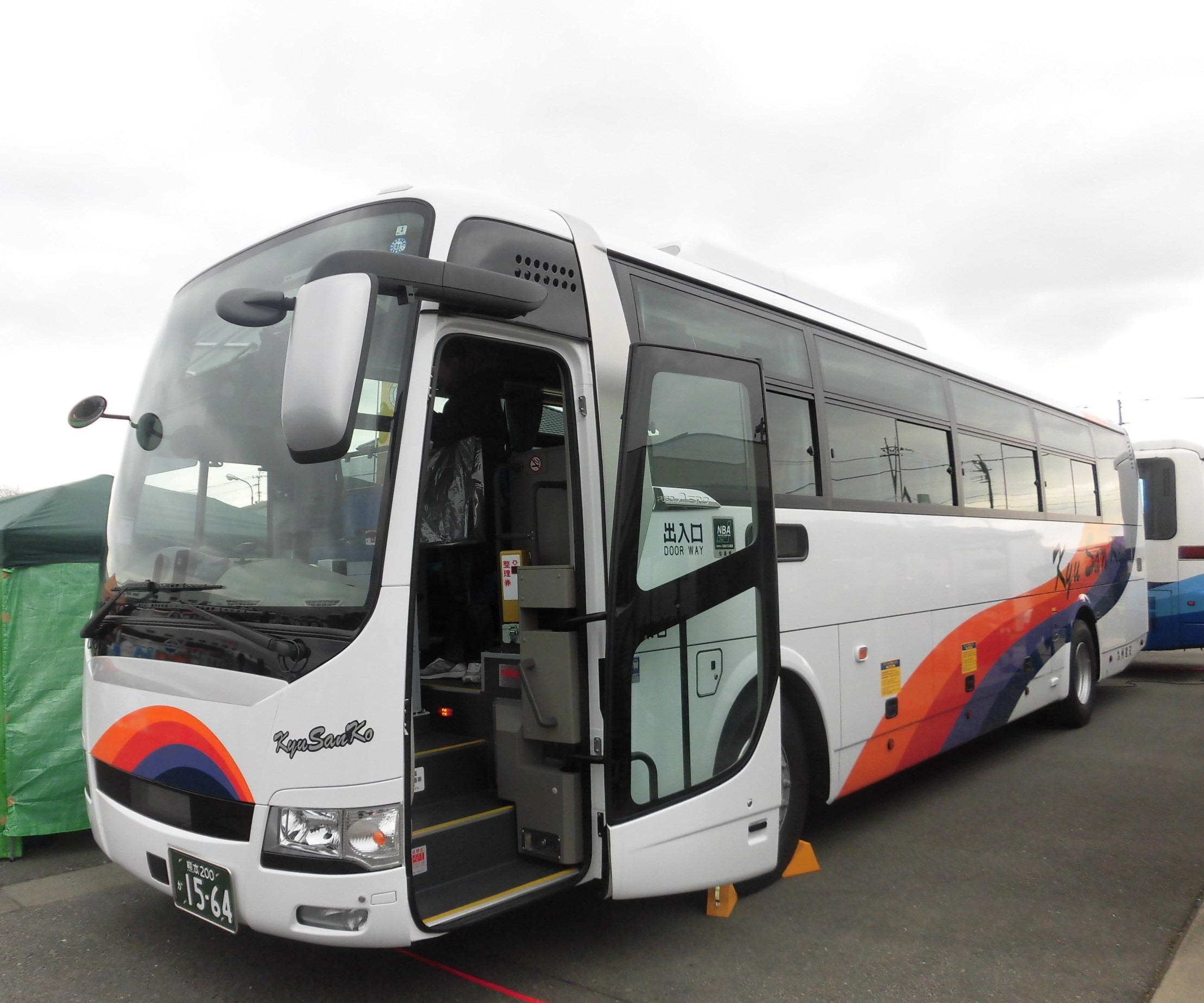 産交バス。産太くんの誕生祭で九州産交バス本社西部車庫で撮影